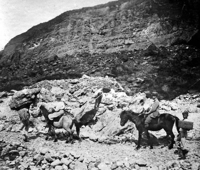 Repronegatief. Tocht te paard naar de krater van de Papandajan